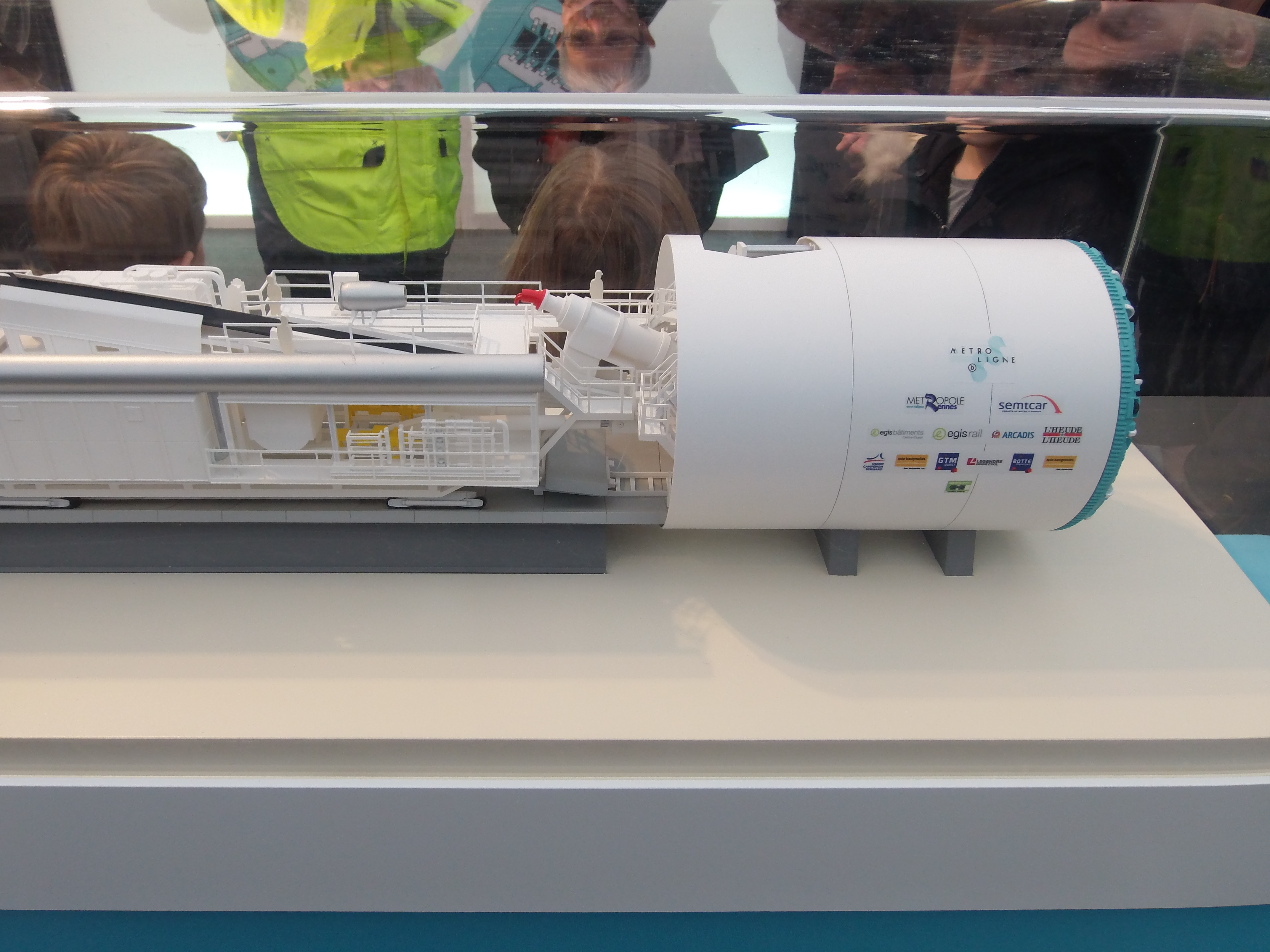 Visite du chantier du tunnelier de la ligne B du métro de Rennes le 22 décembre 2014. Vue de la tête de la maquette du tunnelier.